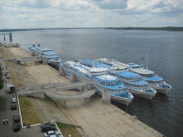 Самара речной вокзал (причал)